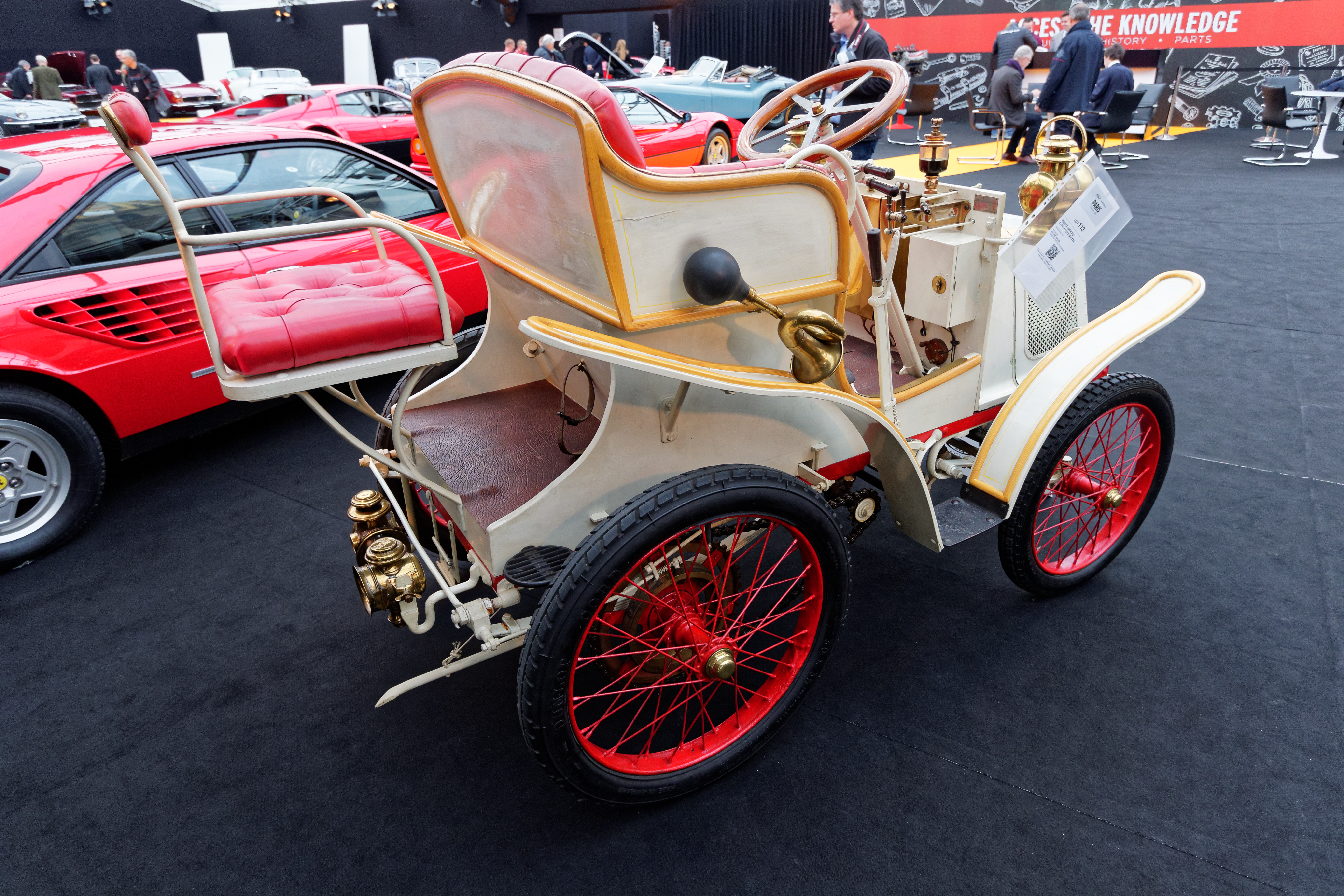 Une Créanche Type A Voiturette 1900 exposée lors de la vente RM Sotheby’s 2016 aux Invalides à Paris